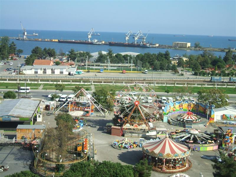 Samsun